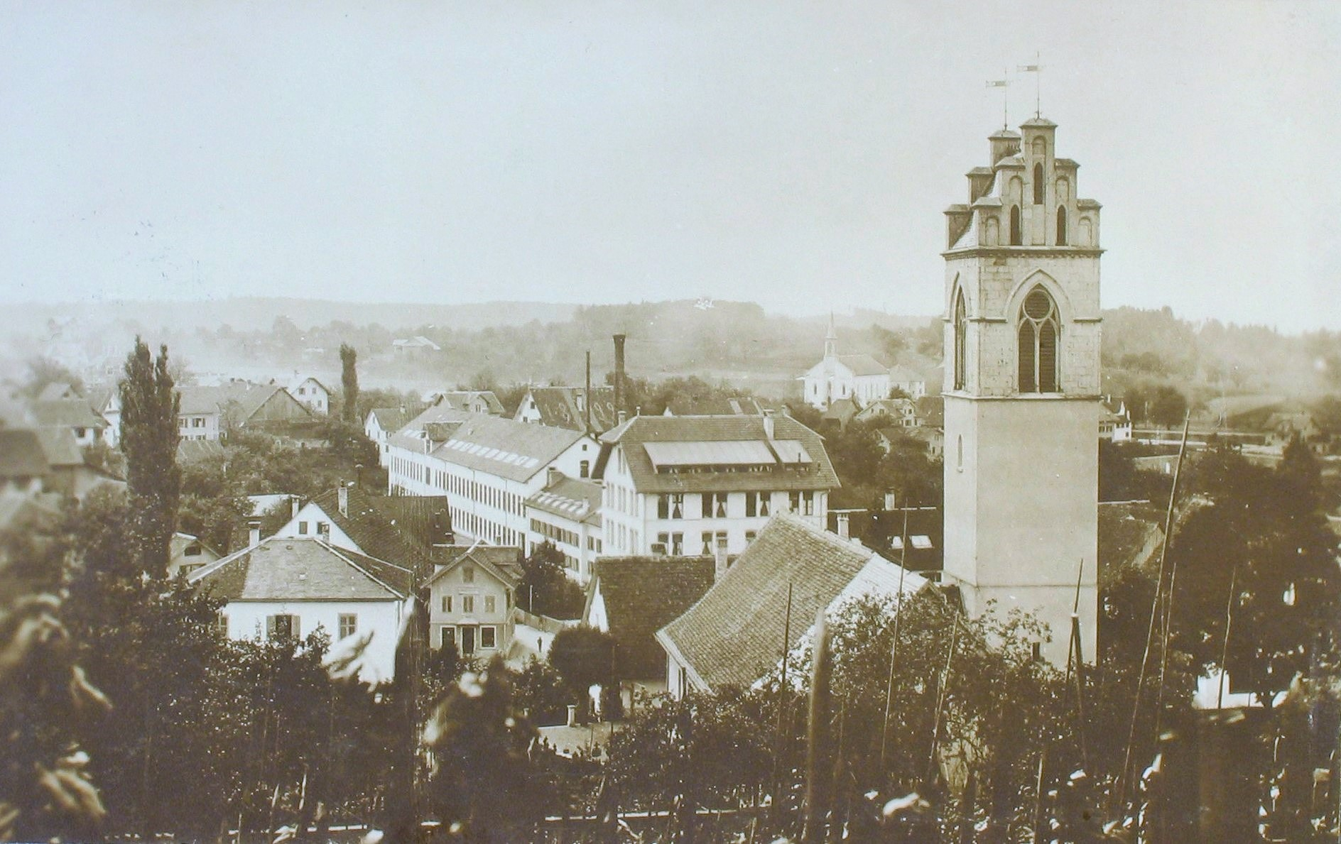 Seidenweberei Gebrüder Näf, Affoltern am Albis ZH, Schweiz, Postkarte mit Poststempel 3.6.1922